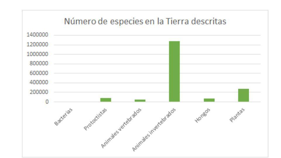 Número de especies en la Tierra descritas